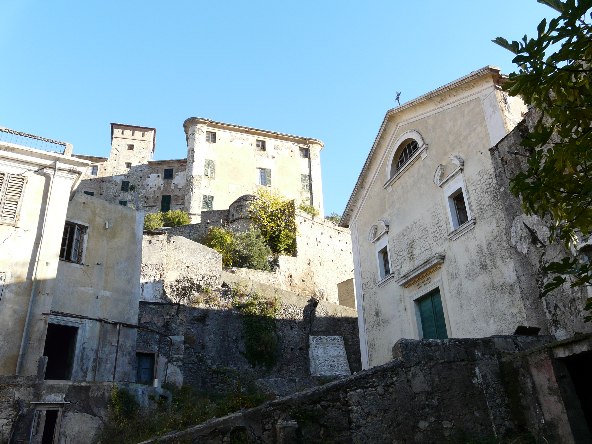 I resti dell'antica chiesa parrocchiale di Sant'Andrea presso il borgo abbandonato di Balestrino Vecchia, Liguria, Italia